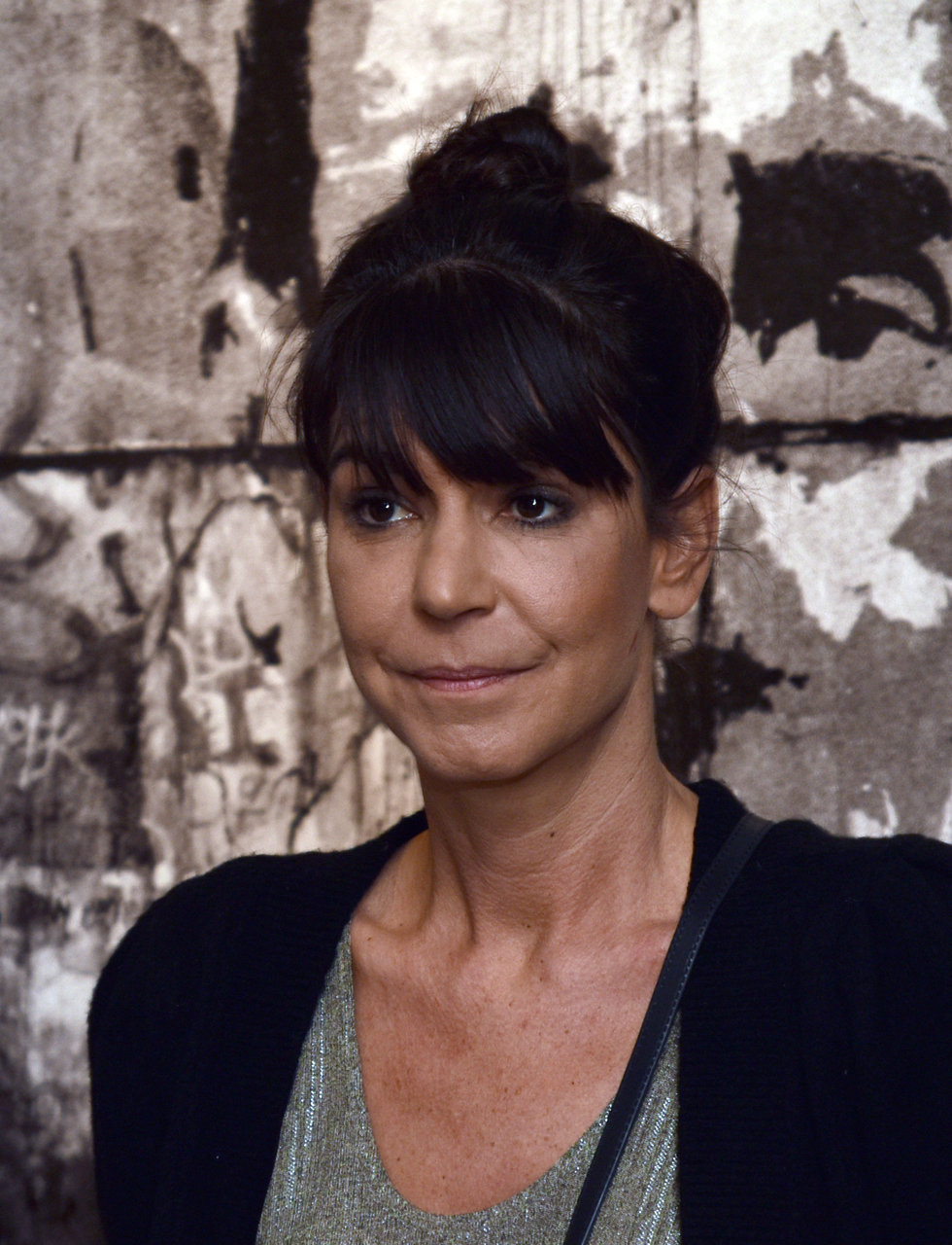 Alžběta Jungrová (2020)